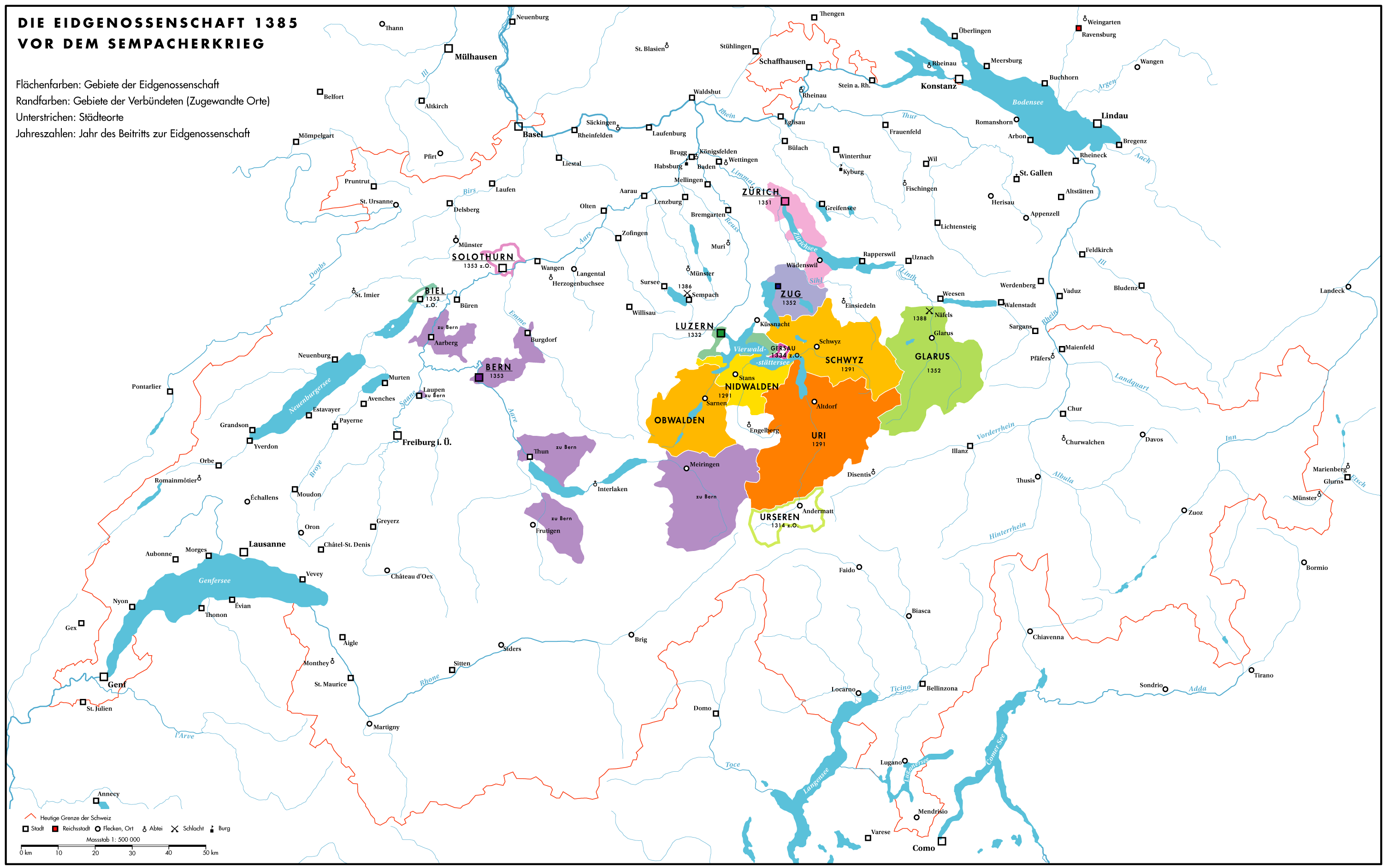 Die schweizerische Eidgenossenschaft um 1385 vor dem Sempacherkrieg